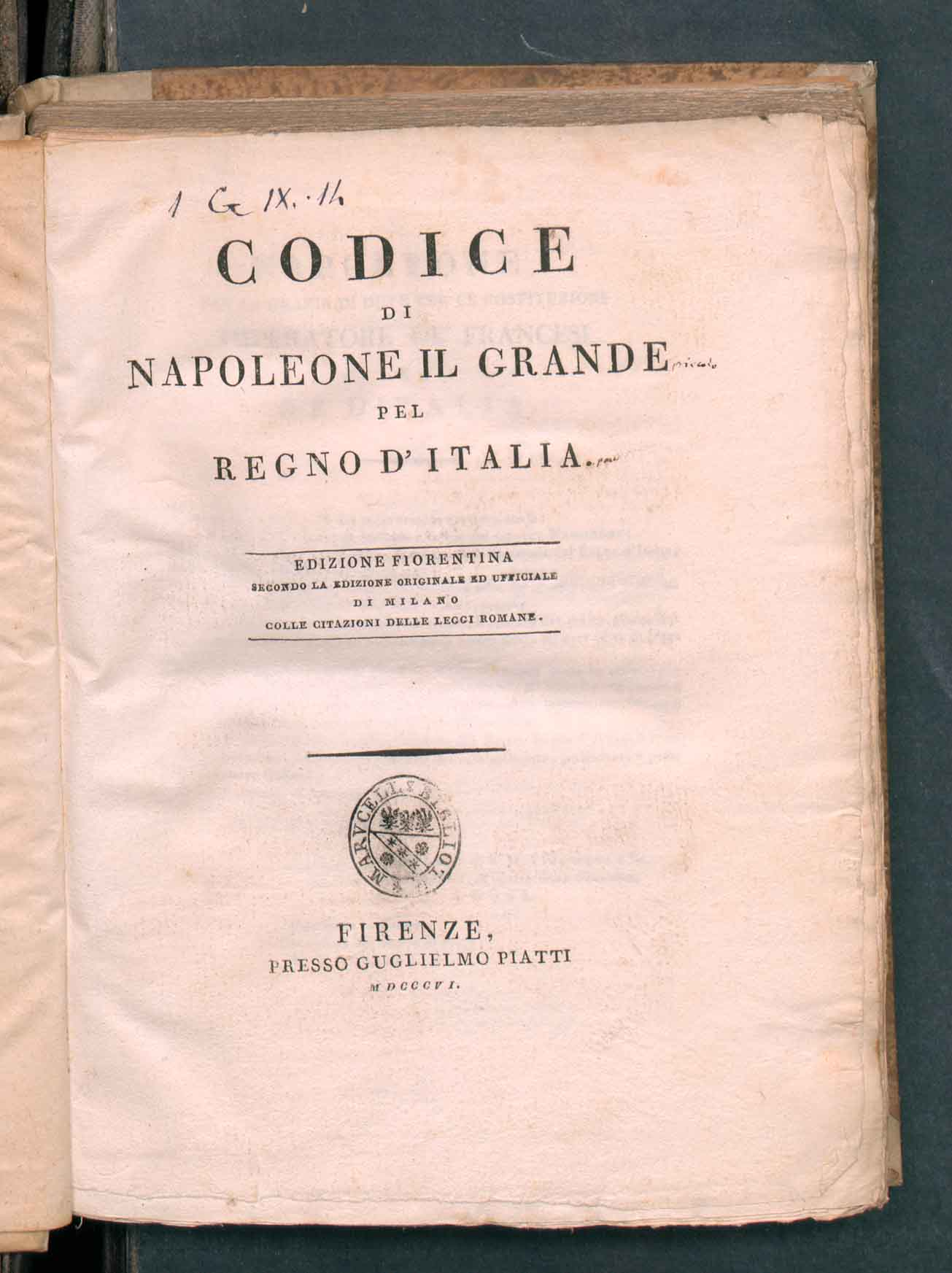 Frontespizio